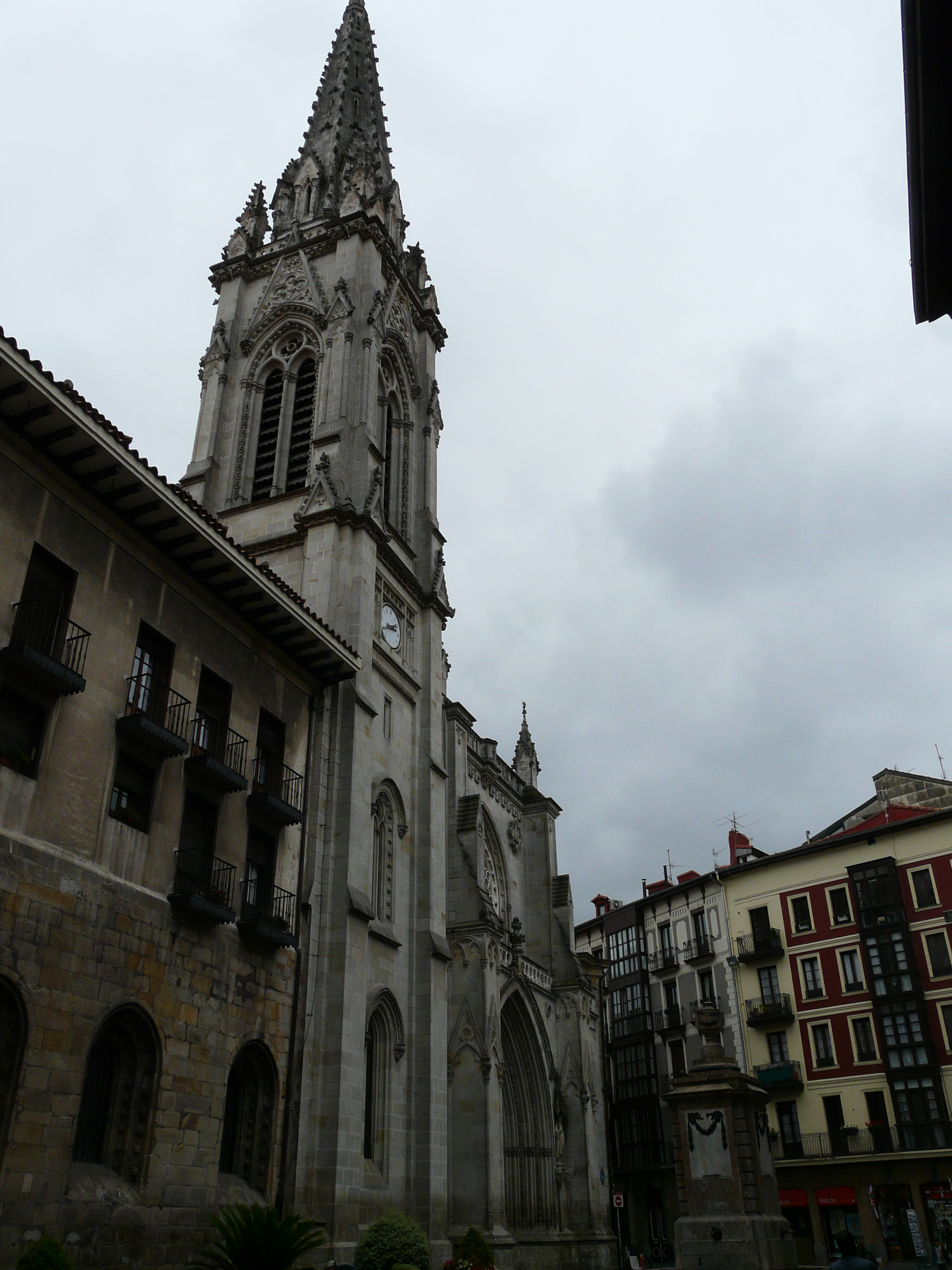 Catedral de Santiago de Bilbao